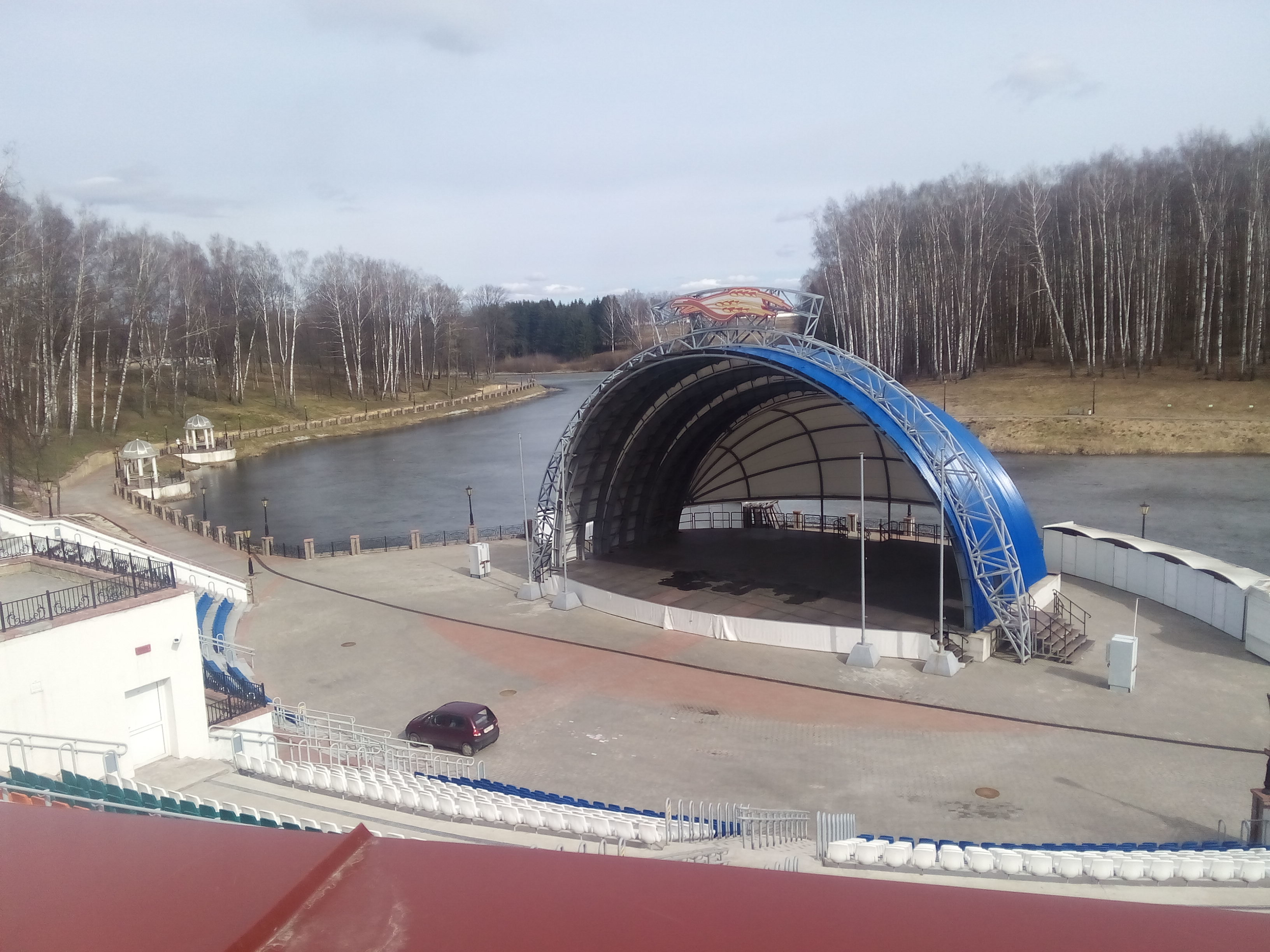 Белорусская сельскохозяйственная академия. Амфитеатр у нижнего озера